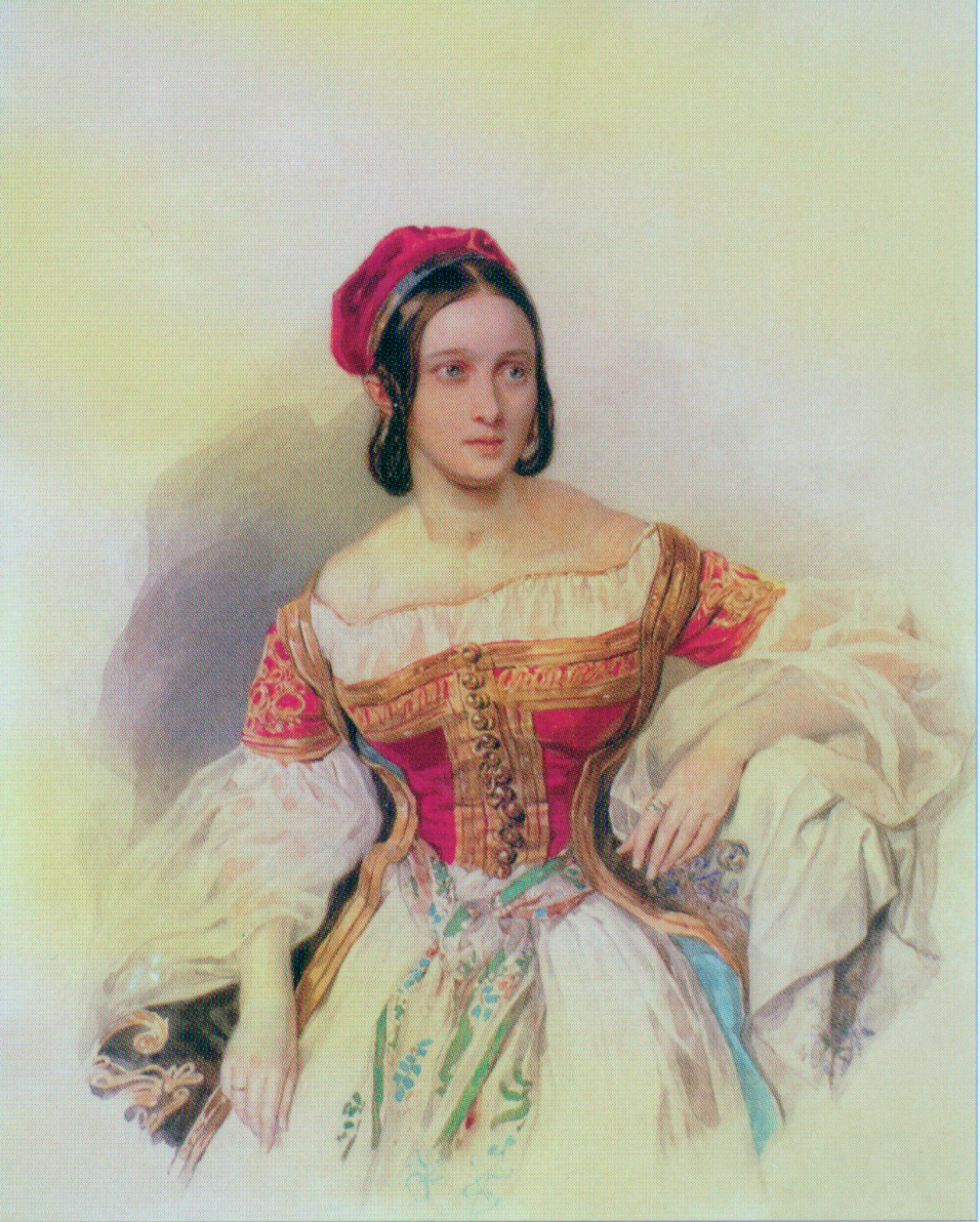 Соколов П. Ф. "Портрет А. О. Витали"